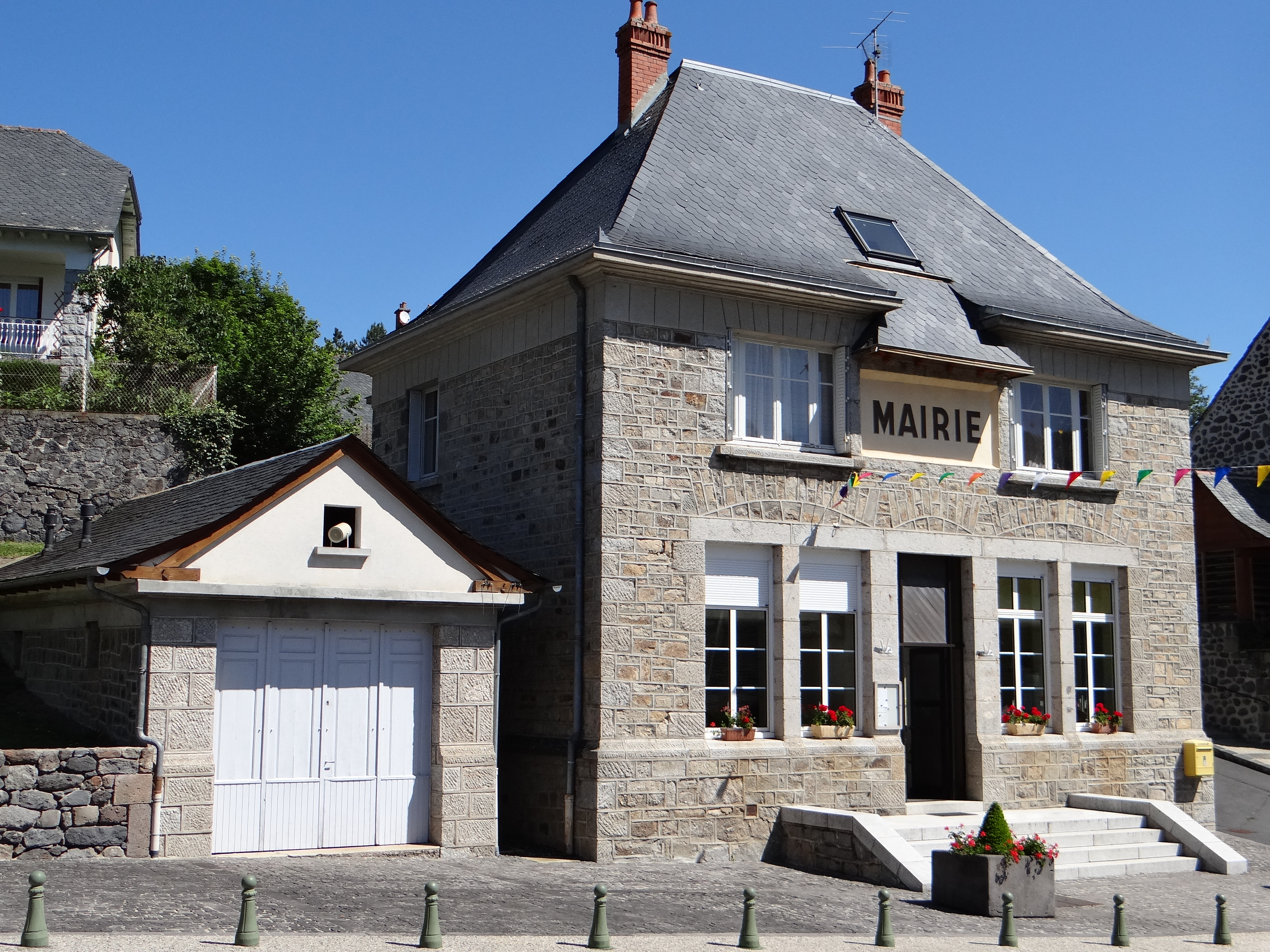 Brommat - Mairie